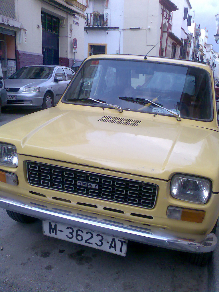 SEVILLE SEAT 127 IMMATRICULEE M, AÑO 5769 andalousie SEVILLA Andalucía ESPAÑA